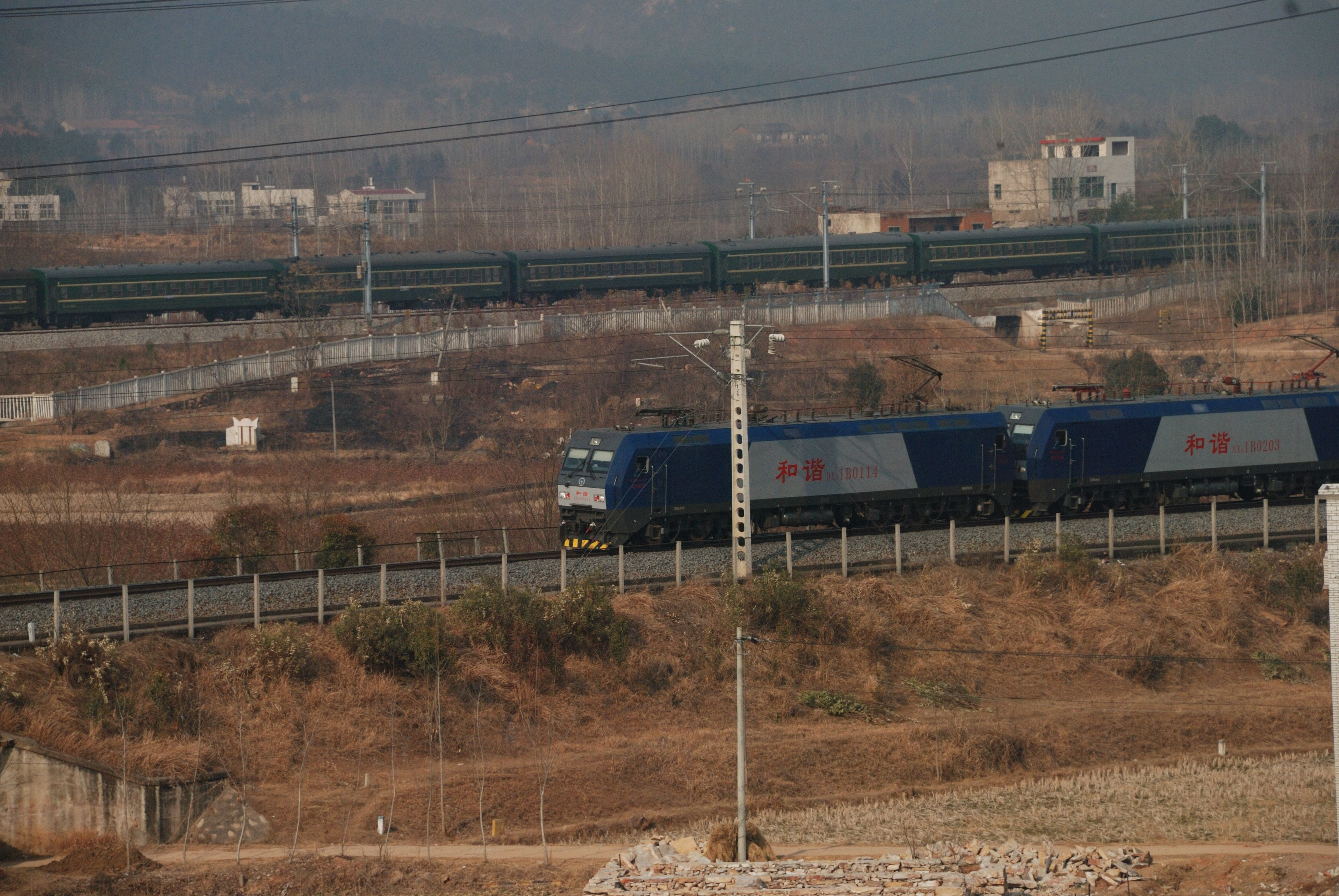 宋埠：磨盘山上远眺横麻铁路